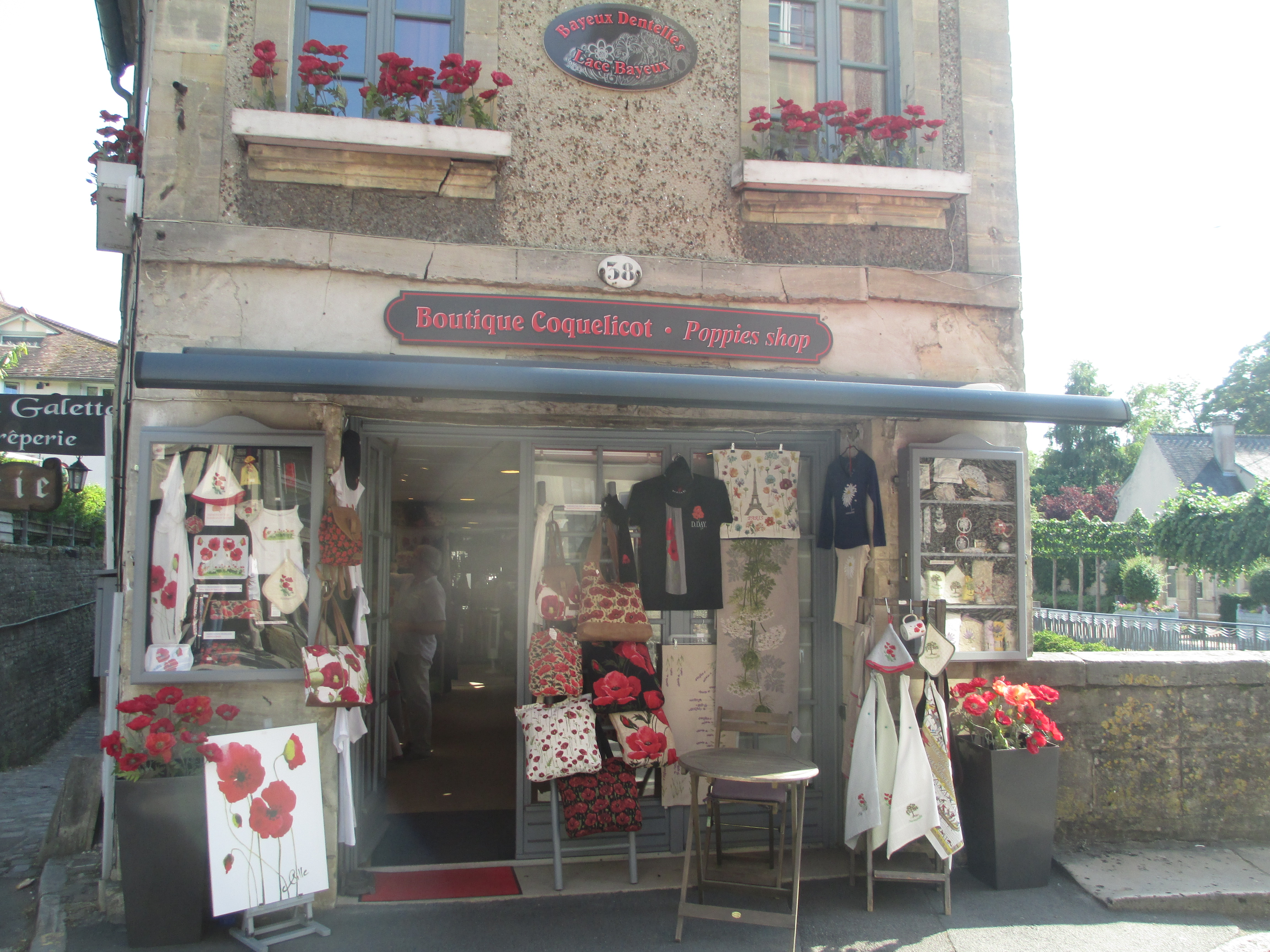 Bayeux